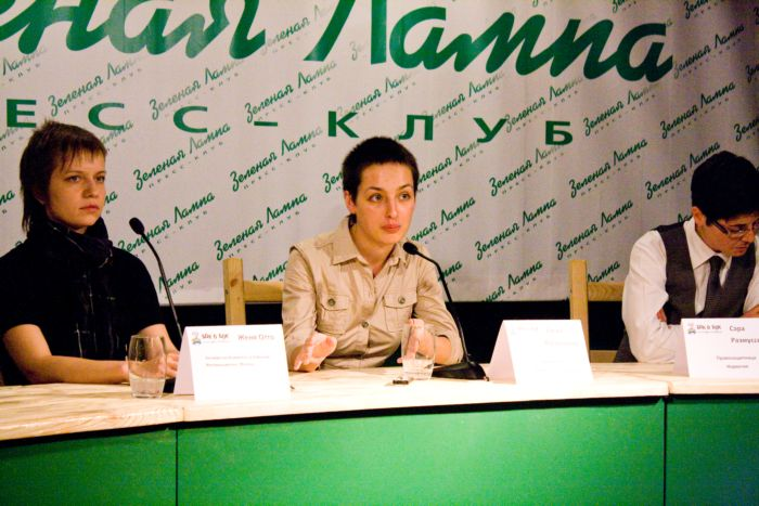 Евгения Отто и Елена Костюченко на кинофестивале "Бок о бок"